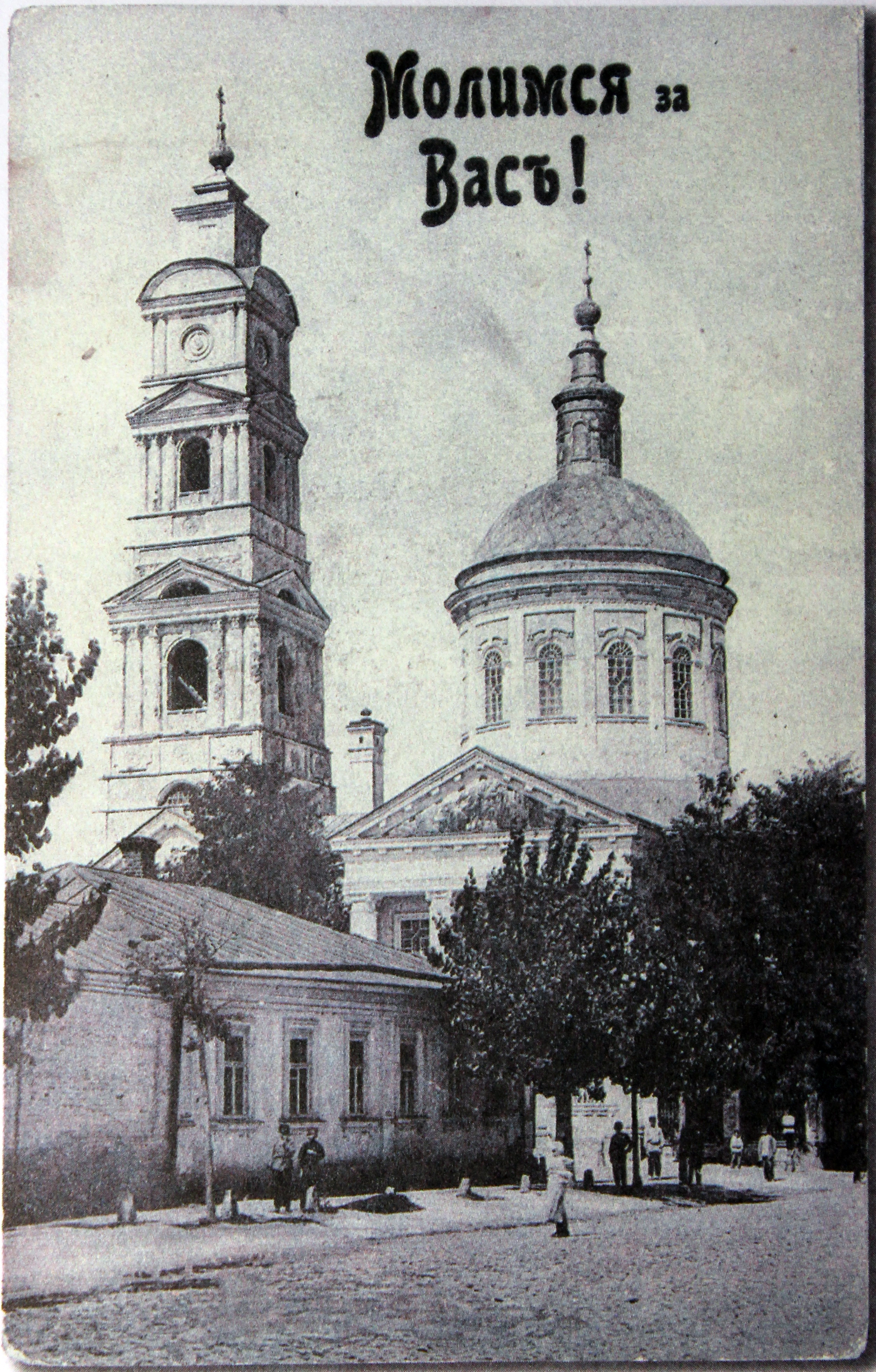 Покровский храм города Рыльска. Открытка 1910 г. Открытки Макарова, Киев, Крещатик, 41